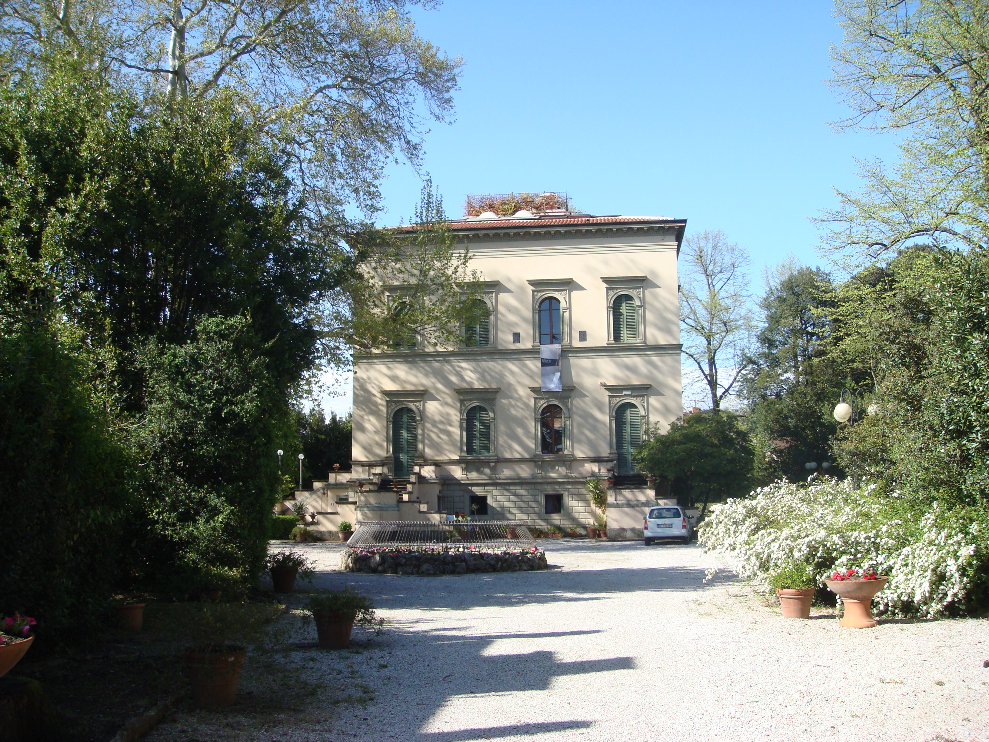 Ingresso della Villa Renatico Martini a Monsummano Terme (Provincia di Pistoia, Italia)